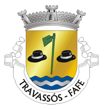 Brasão da Freguesia de Travassós